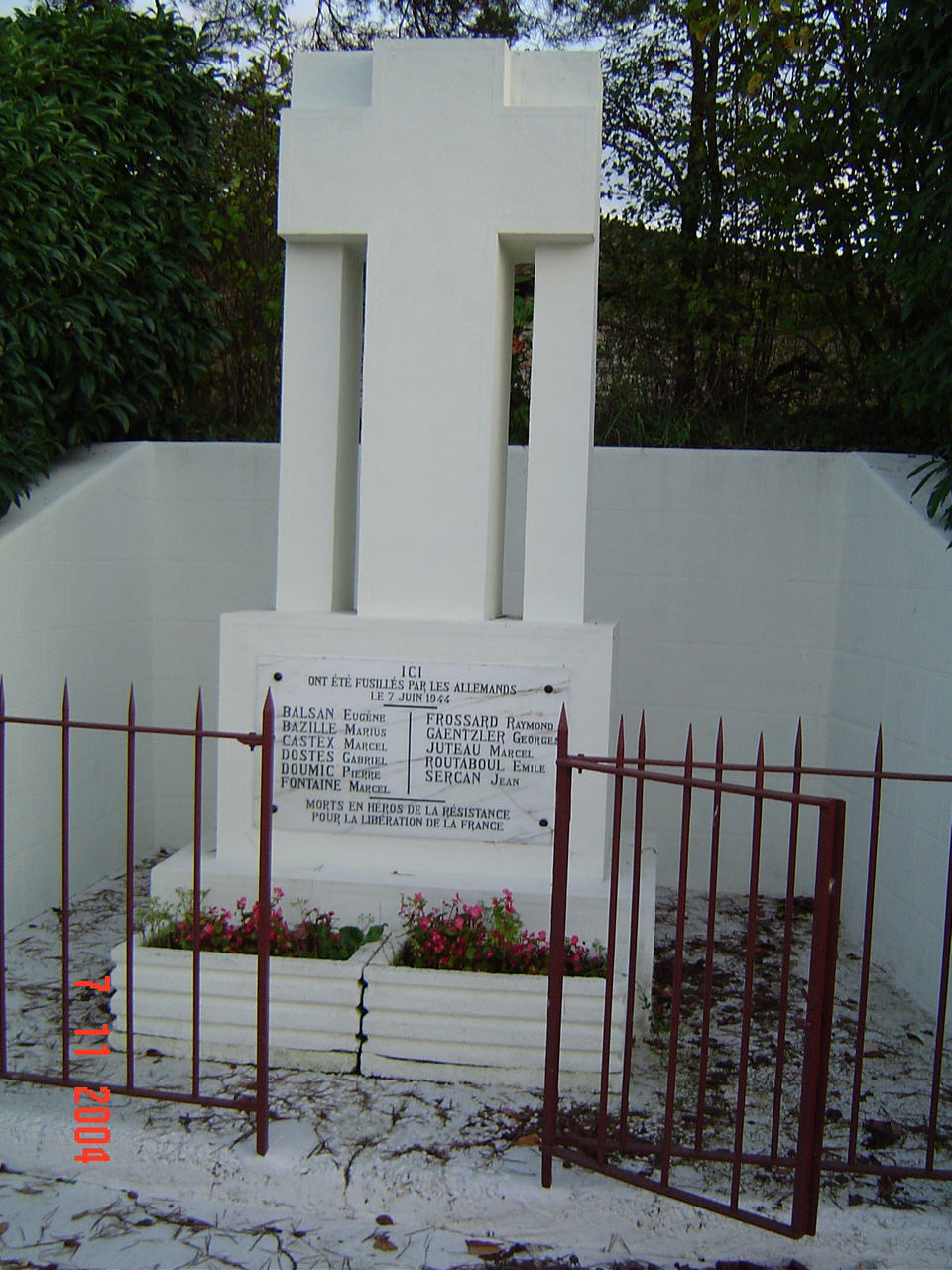 Monument à la mémoire des victimes de la barbarie nazie du 7 juin 1944.